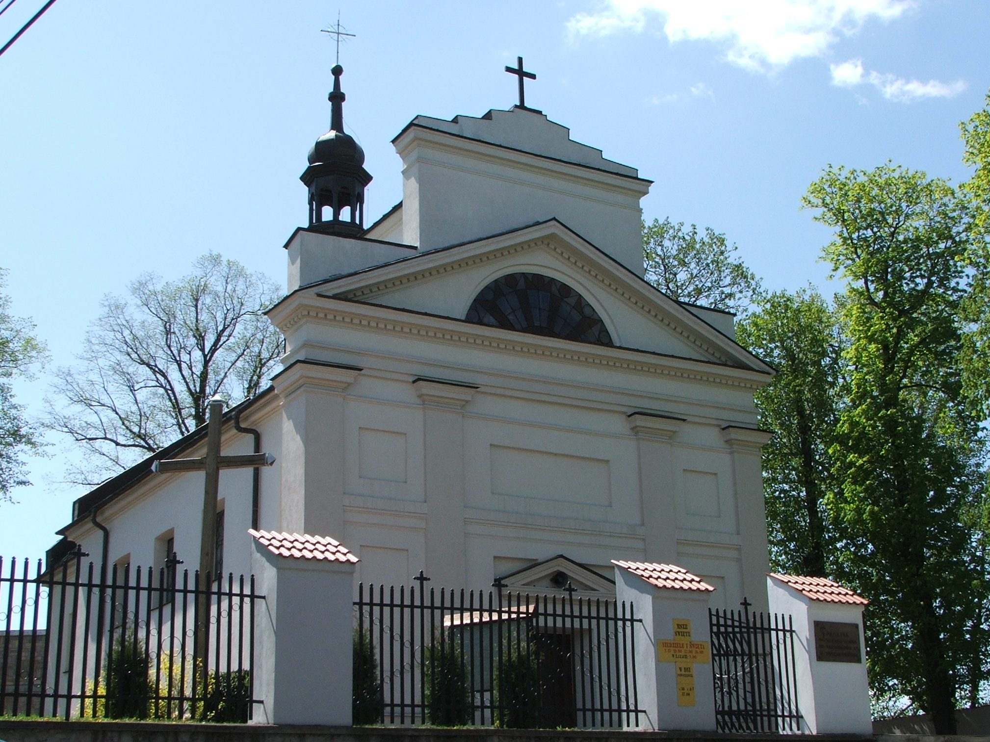 Jerzmanowice (województwo małopolskie)